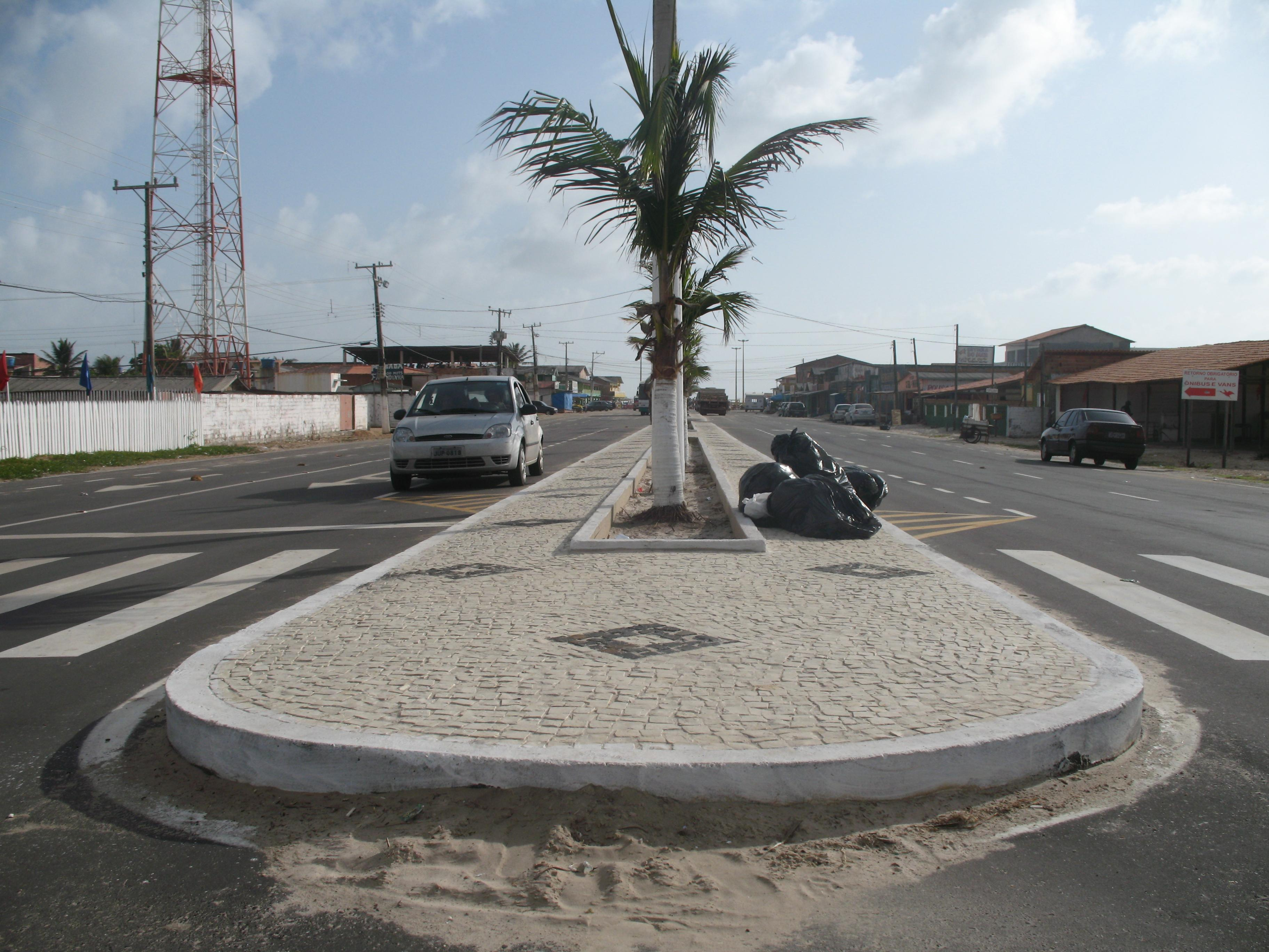 Avenida de entrada para a vila de Ajuruteua